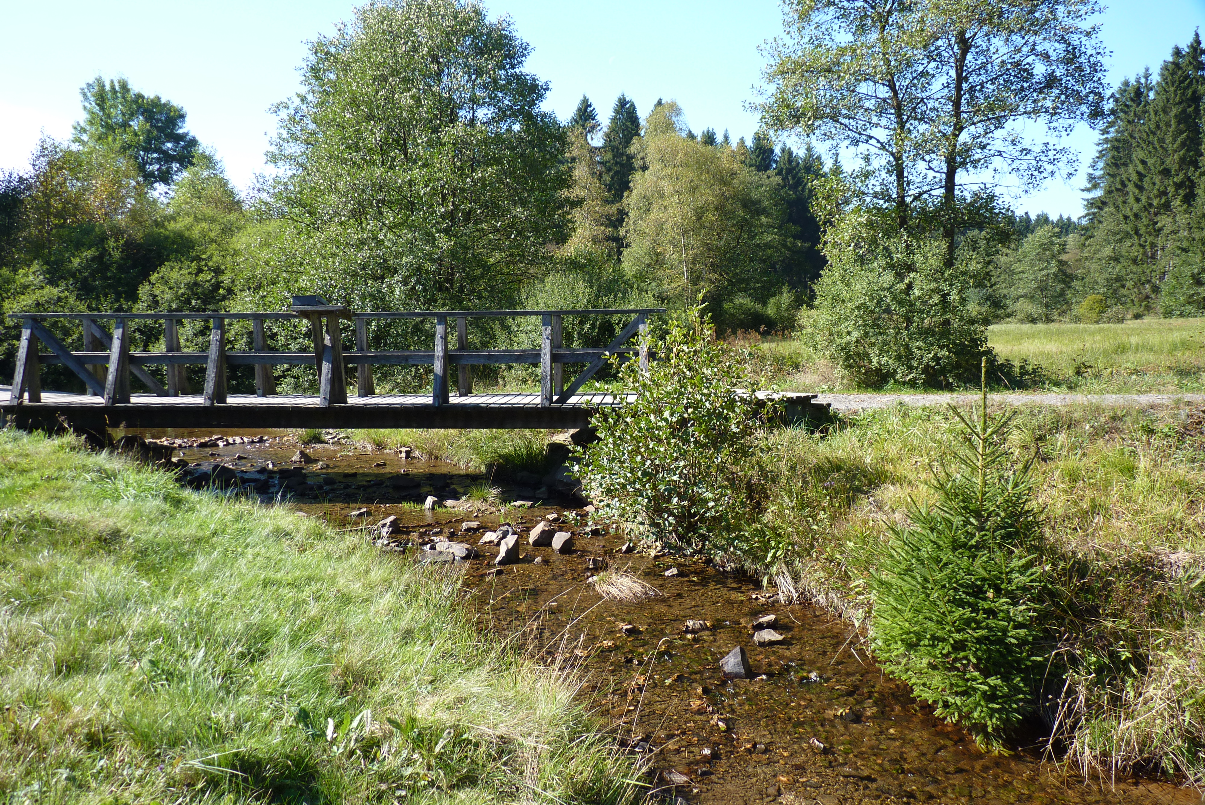 Der Schwarzbach (Röspe) im Naturschutzgebiet „Schwarzbachsystem mit Haberg und Krenkeltal“, im Hintergrund Brücke, über die der Rothaarsteig führt